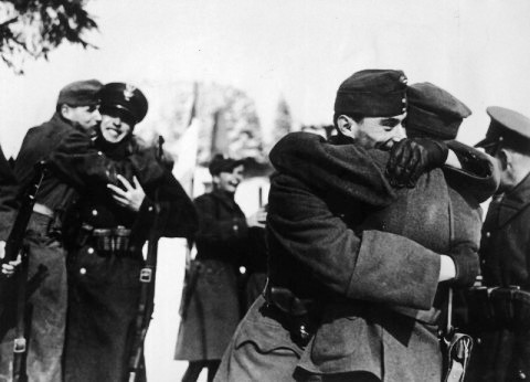 Братание солдат венгерских и польских оккупационных войск в захваченной Чехословакии